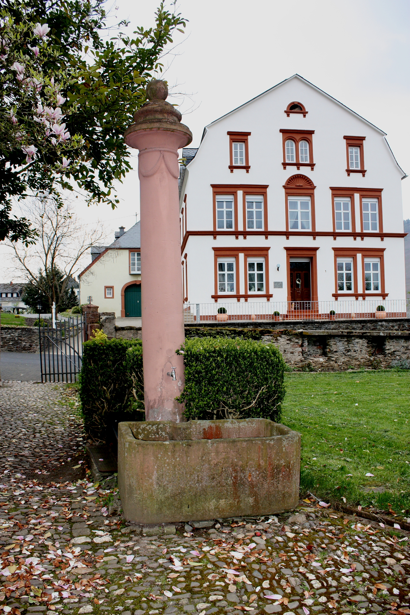 Brunnensäule vor dem ehemaligen herrschaftlichen Wohnhaus der Burg Lösnich 2013 mit den Innitialen GvK des Reichsgrafen Georg von Kesselstatt